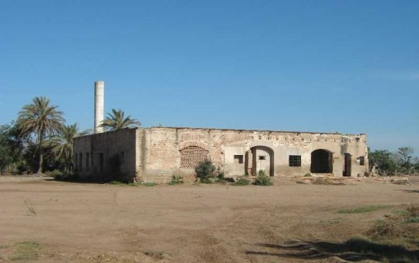 Antiguas Oficinas de lo que era el Ingenio Azucarero